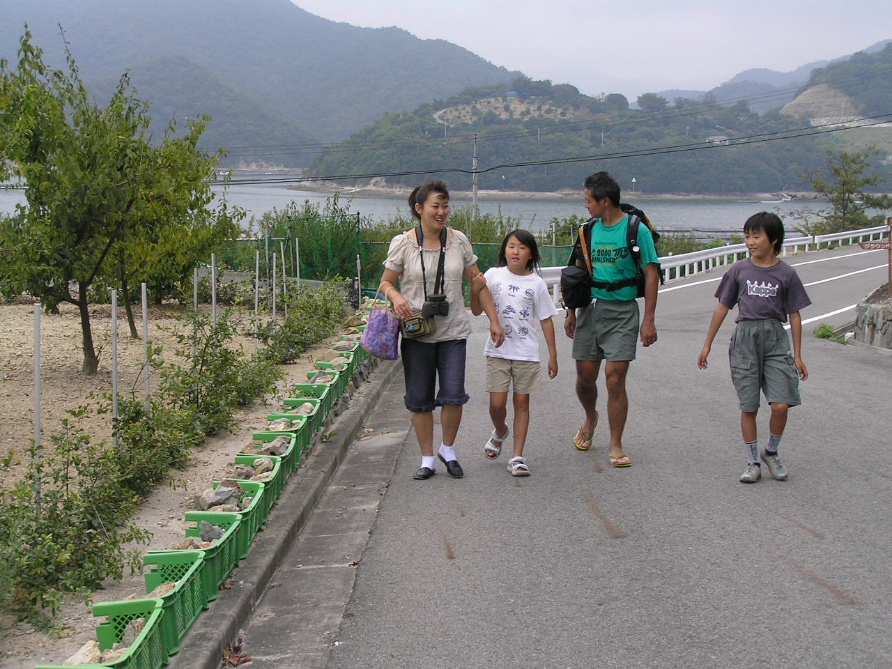 Kashira island in Bizen, Okayama,Japan 岡山県備前市日生町日生,頭島